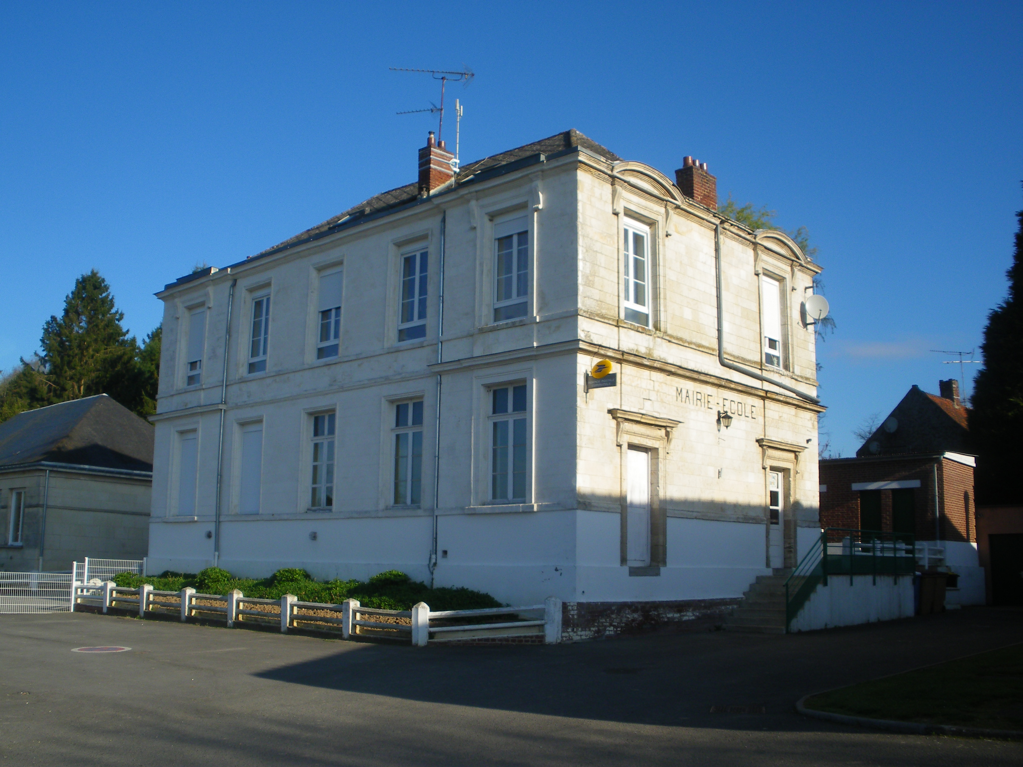 La mairie-école de la commune d'Orville, Pas-de-Calais.